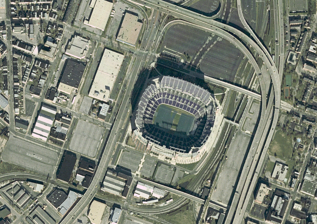 4 août 2006 à 17:27 . . Betp . . 1024×722 (1 645 110 octets) (nasa world wind 1.3.5)